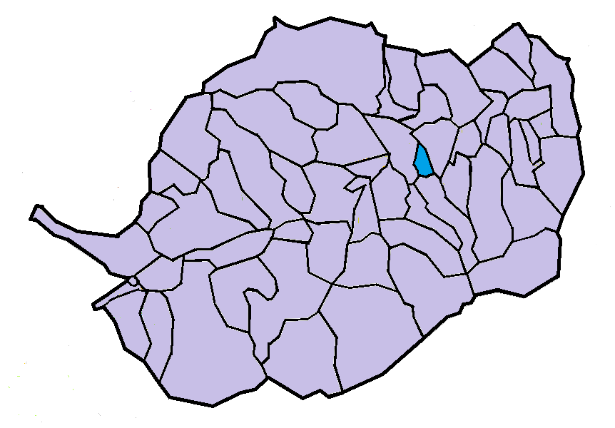 Codalet en el Conflent, a partir del mapa municipal del Conflent de lliure disposició adaptat al Nomenclàtor toponímic aprovat el 2007